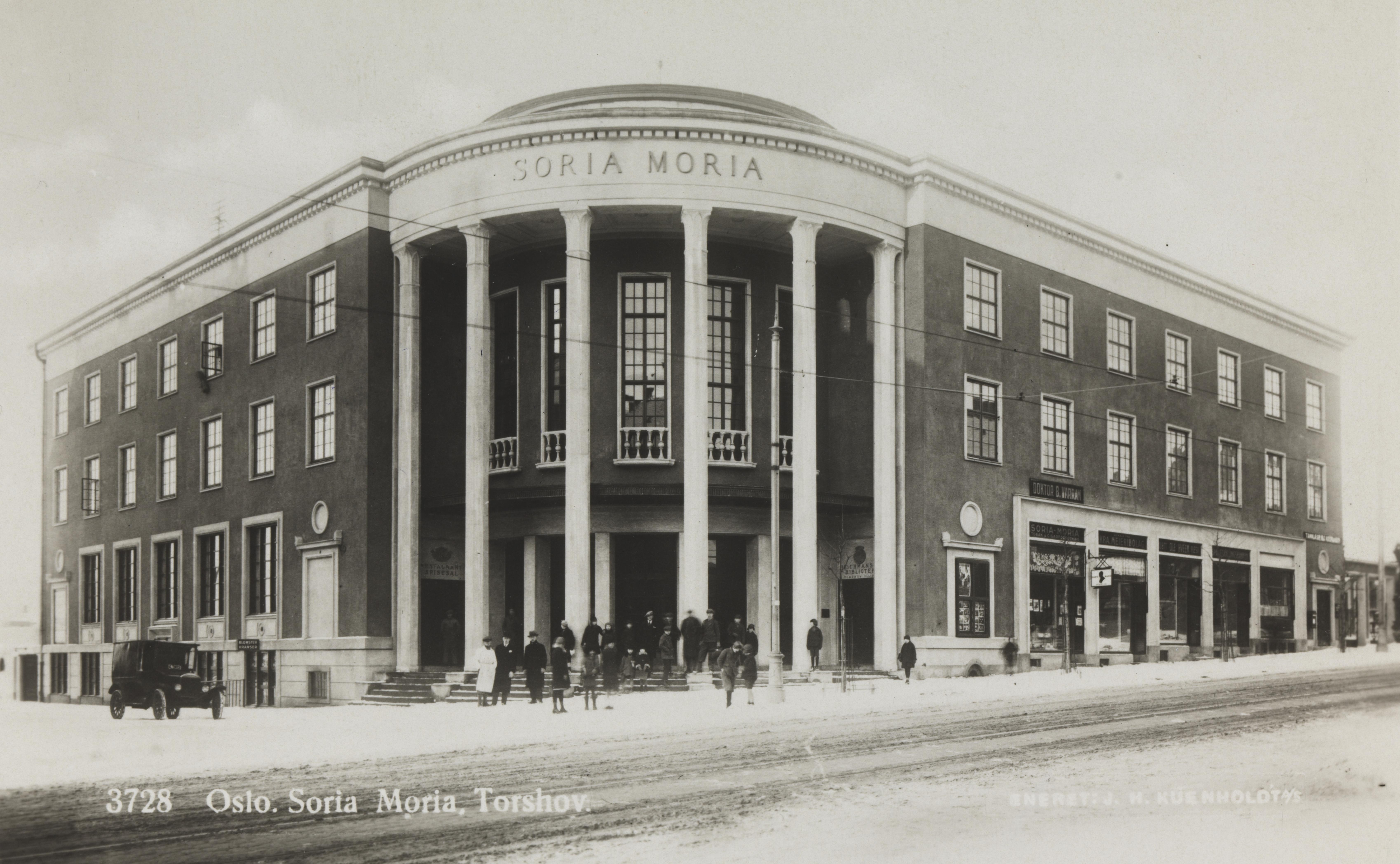 Bildet er hentet fra Nasjonalbibliotekets bildesamling Soria Moria,Torshov,Vogts gate, Oslo, Oslo